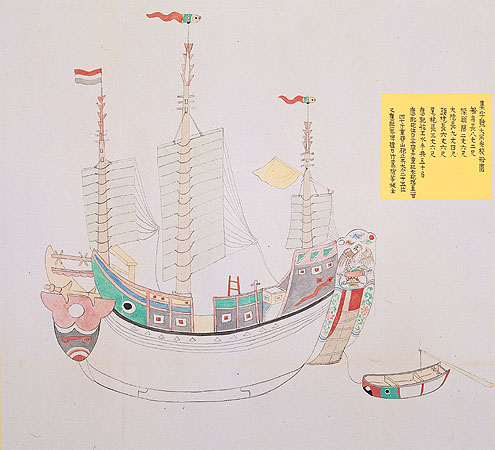 中文（台灣）: 清朝軍機處奏折副本的集字號大同安梭船圖